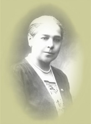 Екатерина Златоустова